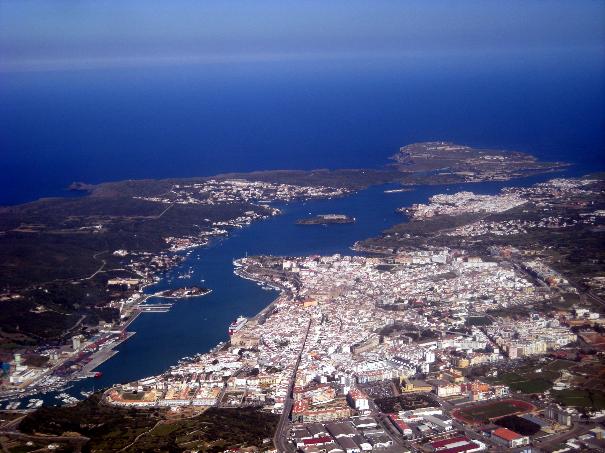 Maó des de l'avió.